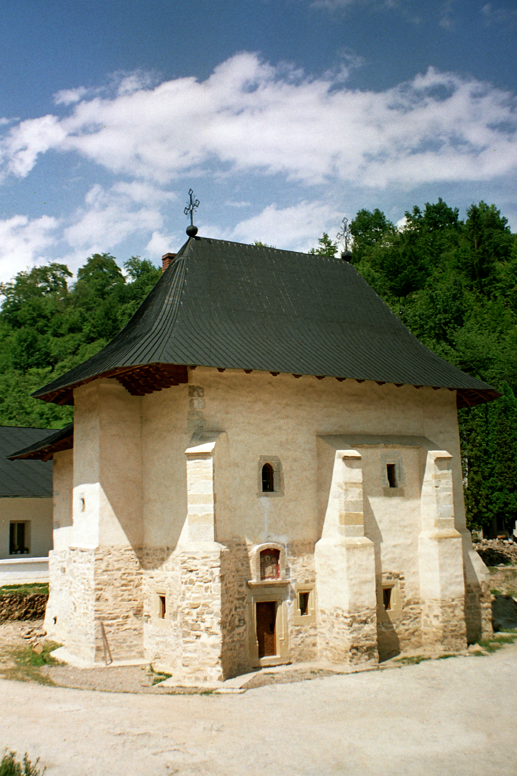 Biserica "Sf. Dumitru", "Sf. Arhangheli Mihail şi Gavril" a mânăstirii Pângăraţi 01